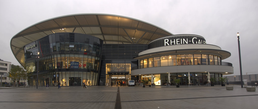 Die Rheingalerie am Tag vor der Grand Opening